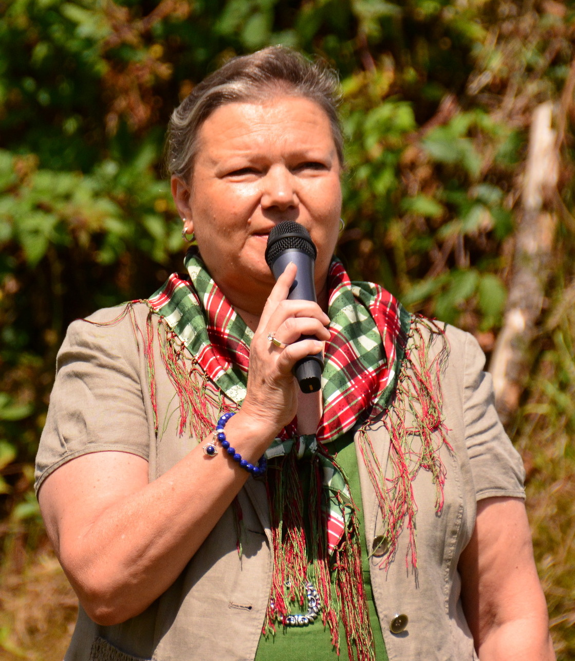 Nationalratsabgeordnete Anneliese Kitzmüller